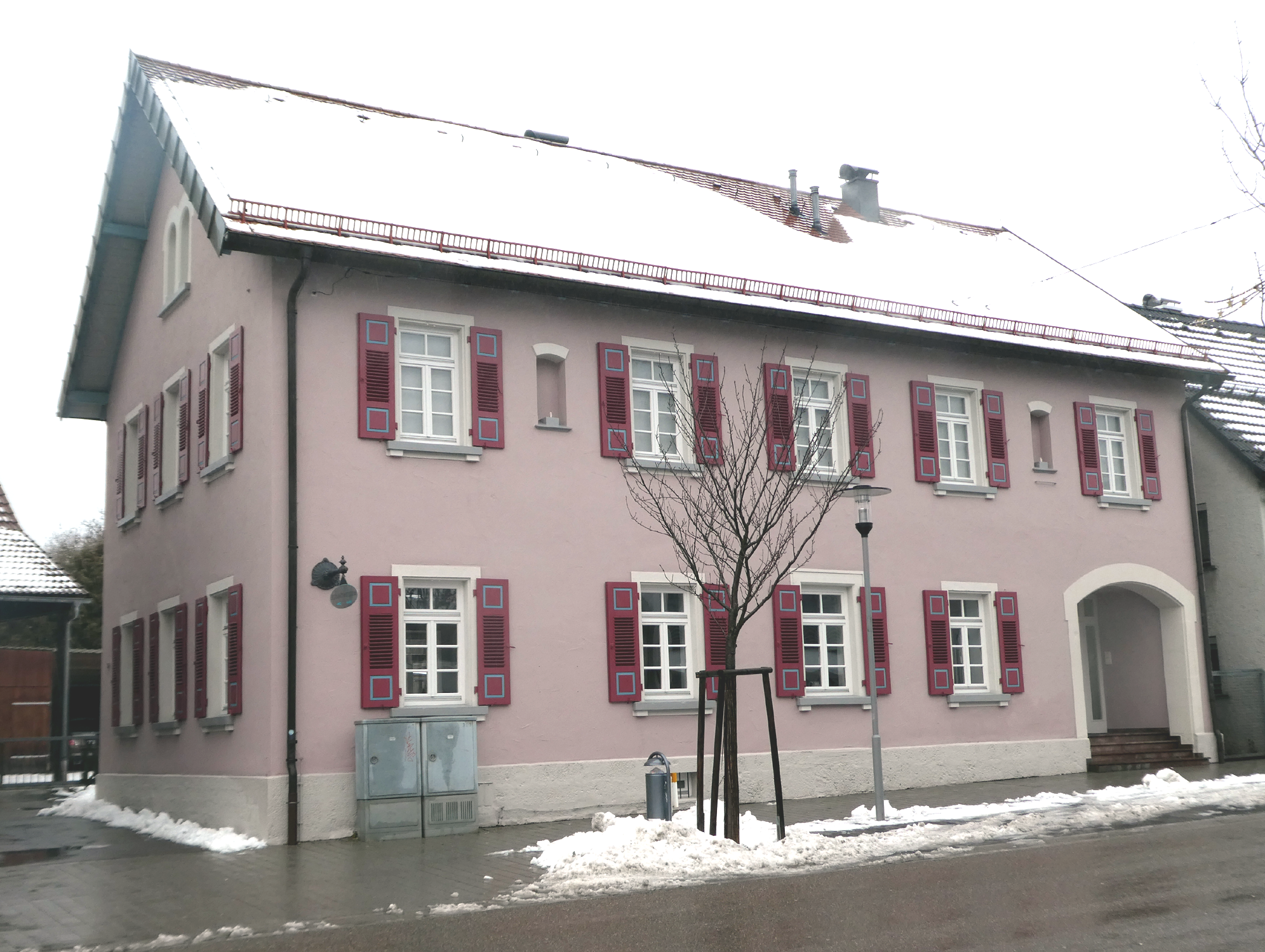 Oberkochen - Schillerhaus, heute Heimatmuseum